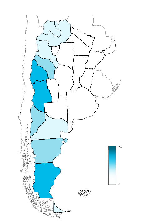 Areas de avistamientos